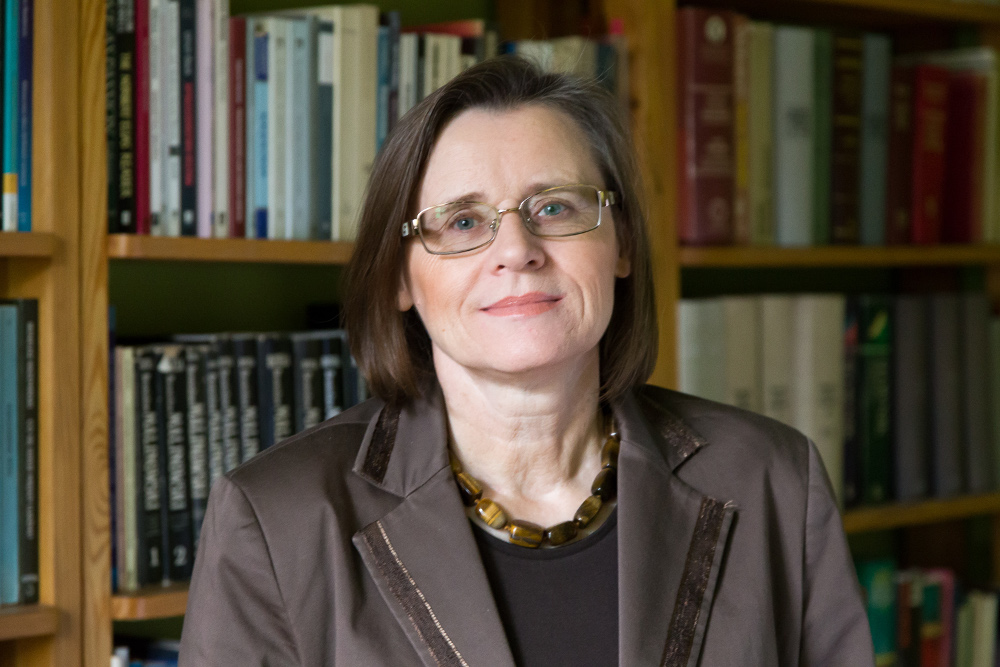 Elżbieta Hałas